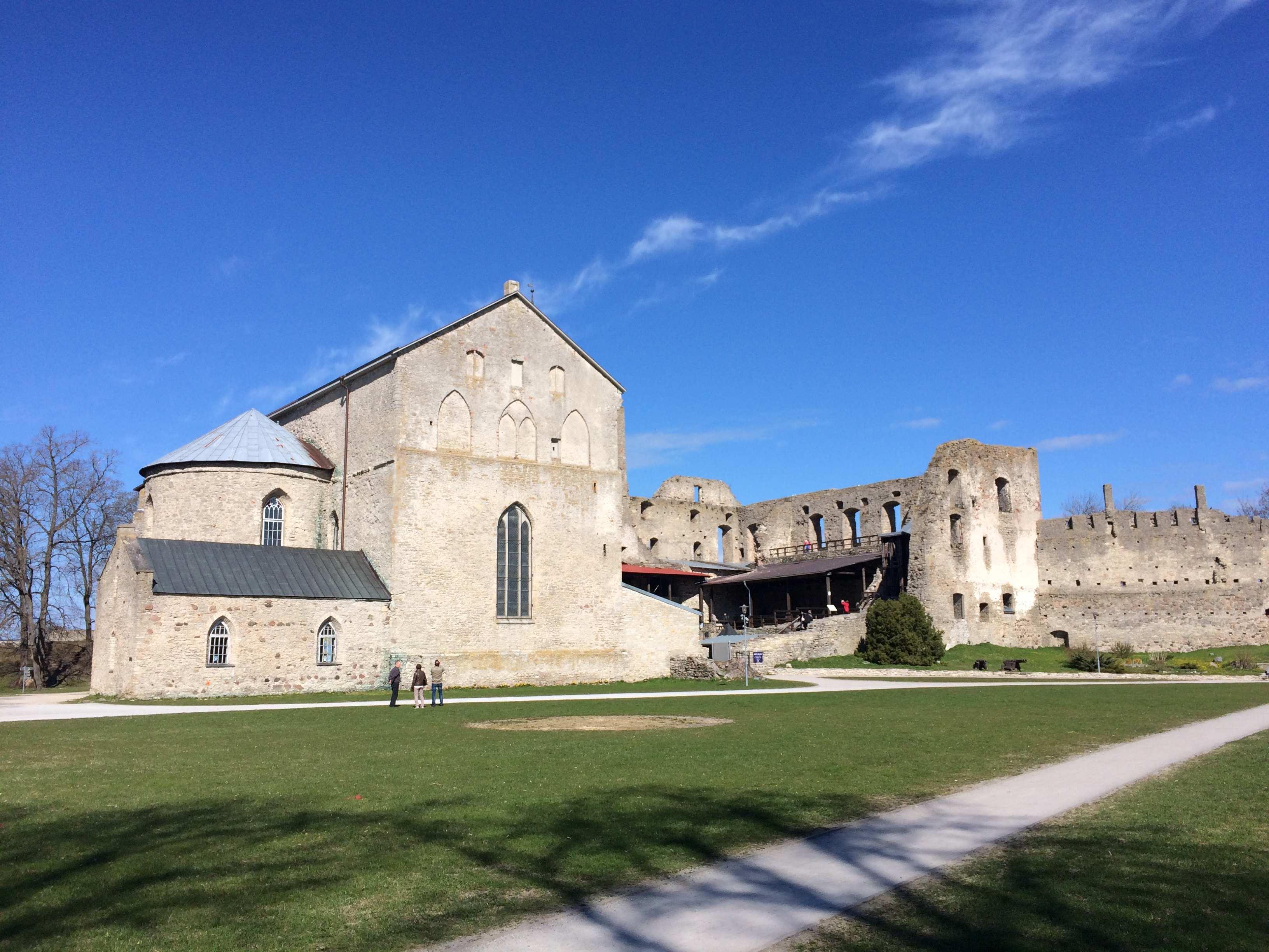 Haapsalu piiskopilinnus